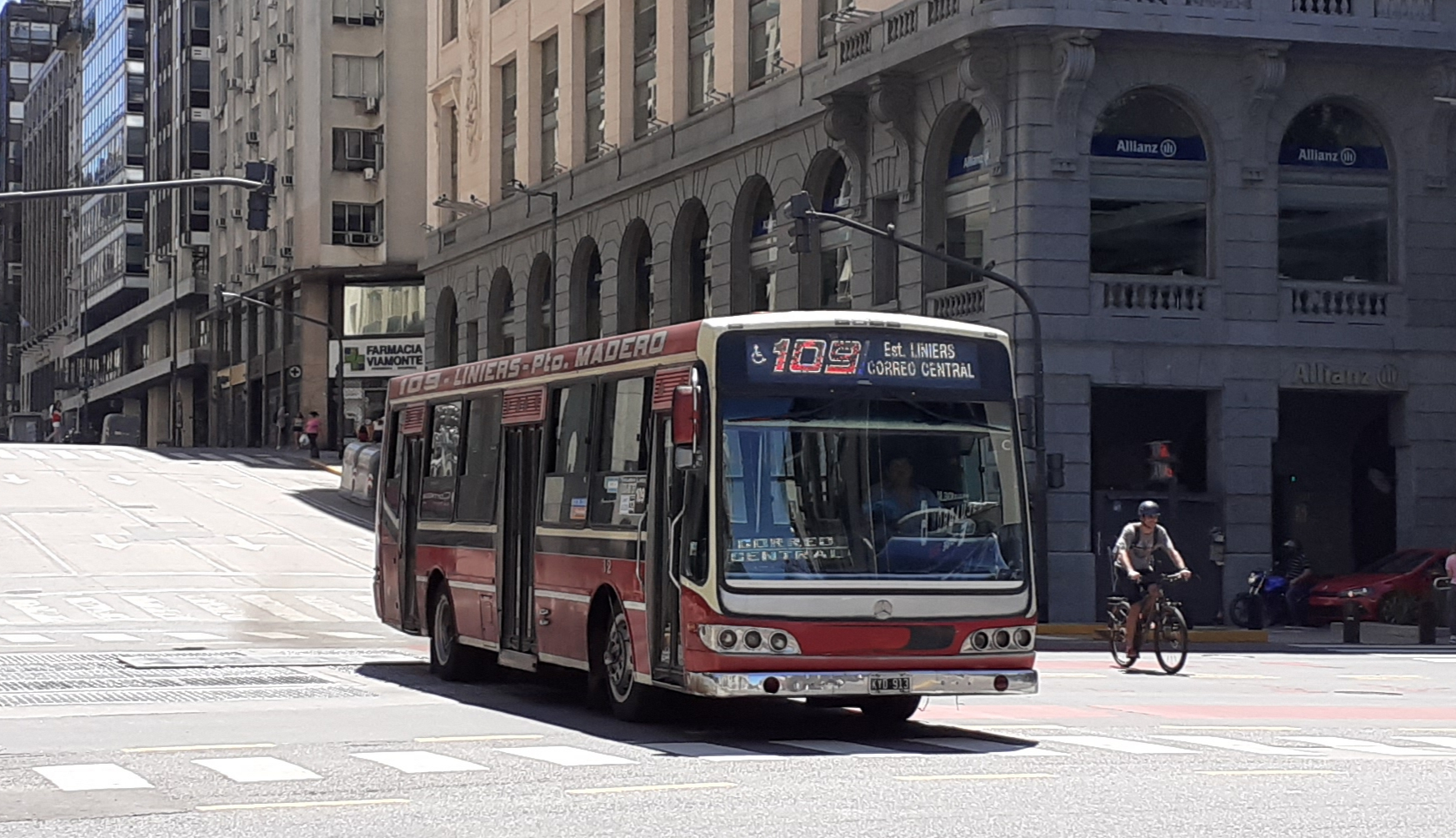 Interno 12 de la línea 109 de colectivos de Buenos Aires circulando por la Avenida Corrientes.